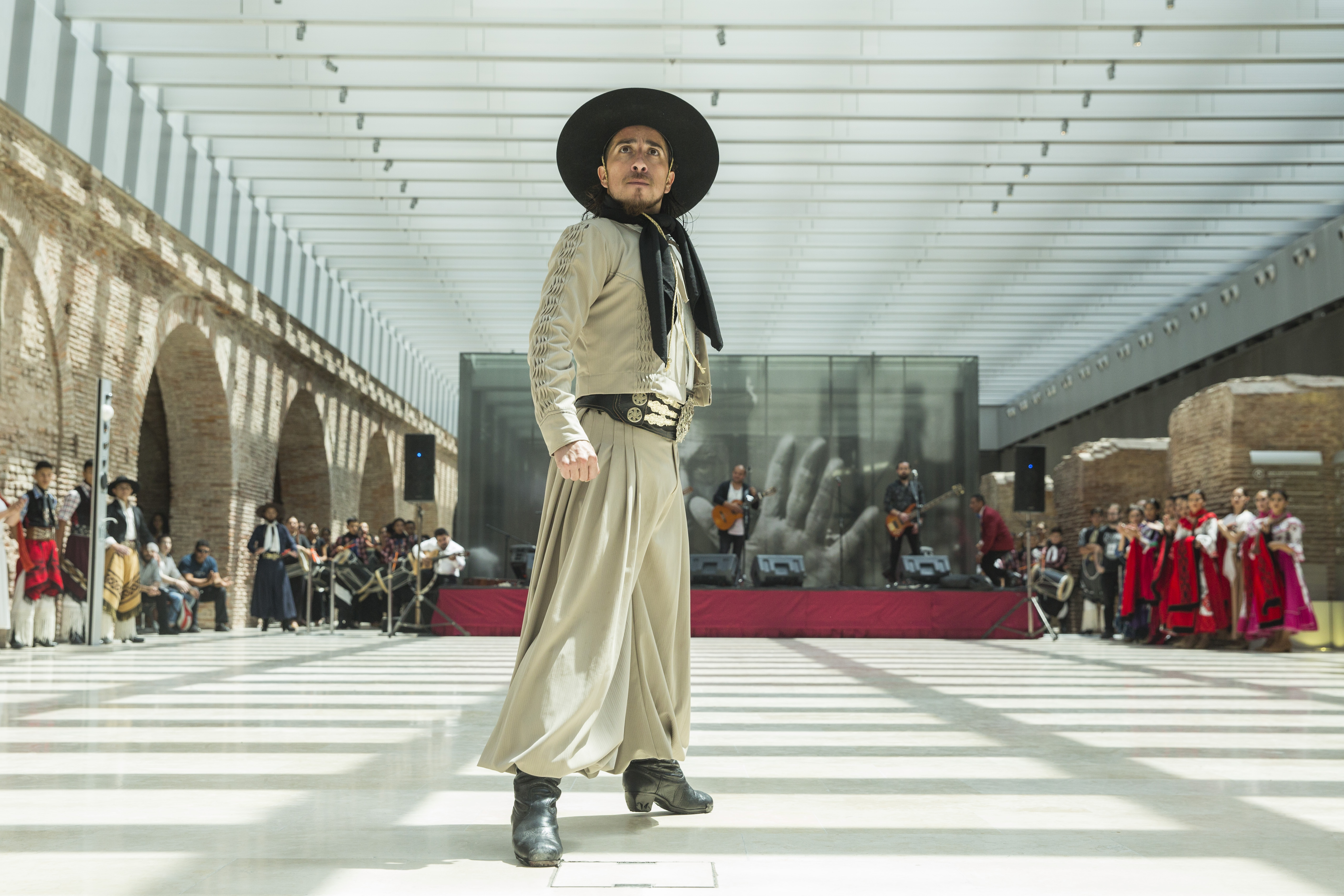 Buenos Aires, 01 de diciembre de 2017 El Ministerio de Cultura de la Nación homenajeó a la Escuela de Danza Chakaymanta, de Mendoza, en el Museo de Casa Rosada. Con motivo de sus 45 años de trabajo, la asociación civil fue invitada a realizar una presentación artística. El homenaje fue declarado de Interés Cultural. En el evento estuvieron presentes el ministro de Cultura de la Nación, Pablo Avelluto, el secretario de Cultura de Mendoza, Diego Gareca, la Directora de Gestión Territorial de la Secretaría de Cultura de la provincia Mendoza, Laura Uano, el secretario de Cultura y Creatividad, Andrés Gribnicow, y el subsecretario de Cultura Ciudadana, Nicolás Roibás. Fotos: Silvina Frydlewsky / Ministerio de Cultura de la Nación